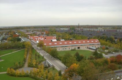 Enghøjskolen, Hvidovres nyeste skole